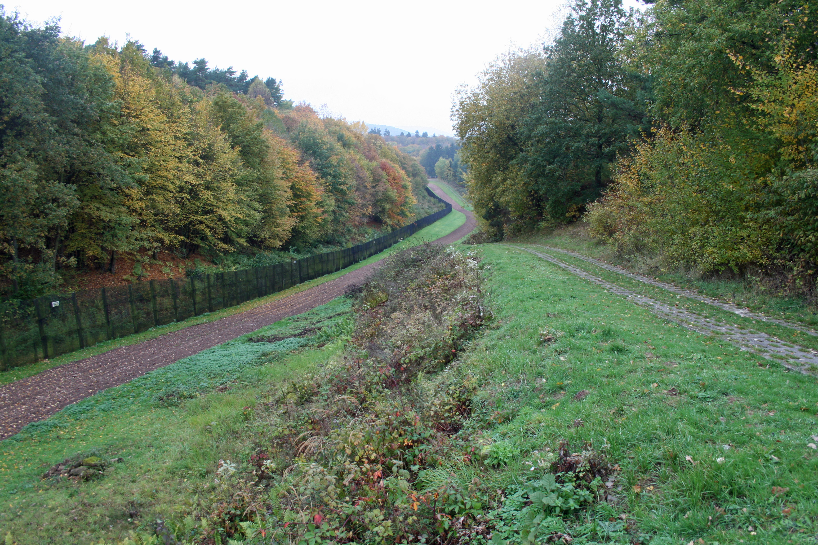 Innerdeutsche Grenze beim Grenzmuseum Schifflersgrund. Das Bild zeigt die innerdeutsche Grenze zwischen Thüringen und Hessen. Vom Grenzmuseum Schifflersgrund (bei Bad Sooden-Allendorf) wird dort ein Teil der ehemaligen Grenze erhalten. Zu sehen ist der seinerzeit mit SM-70-Minen gesicherte Grenzzaun (einreihiger Metallgitterzaun) davorliegendem Kontrollstreifen (Spurensicherungsstreifen) und Kolonnenweg mit Fahrspurplatten. Die eigentliche Grenze befindet sich oberhalb des mittlerweile bewaldeten Hangs.